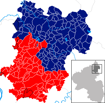 Die ehemaligen preußischen Landkreise Unterwesterwaldkreis, Oberwesterwaldkreis und Westerburg nach der preußischen Gebietsreform von 1932 im Gebiet des heutigen Westerwaldkreises (dargestellt sind heutige Ortsgemeindegrenzen). Schwarz umrandet sind Gemeinden oder Gemeindeteile, die heute nicht mehr zum Westerwaldkreis gehören. Dunkelblau = Oberwesterwaldkreis mit Sitz in Westerburg Rot = Unterwesterwaldkreis mit Sitz in Montabaur